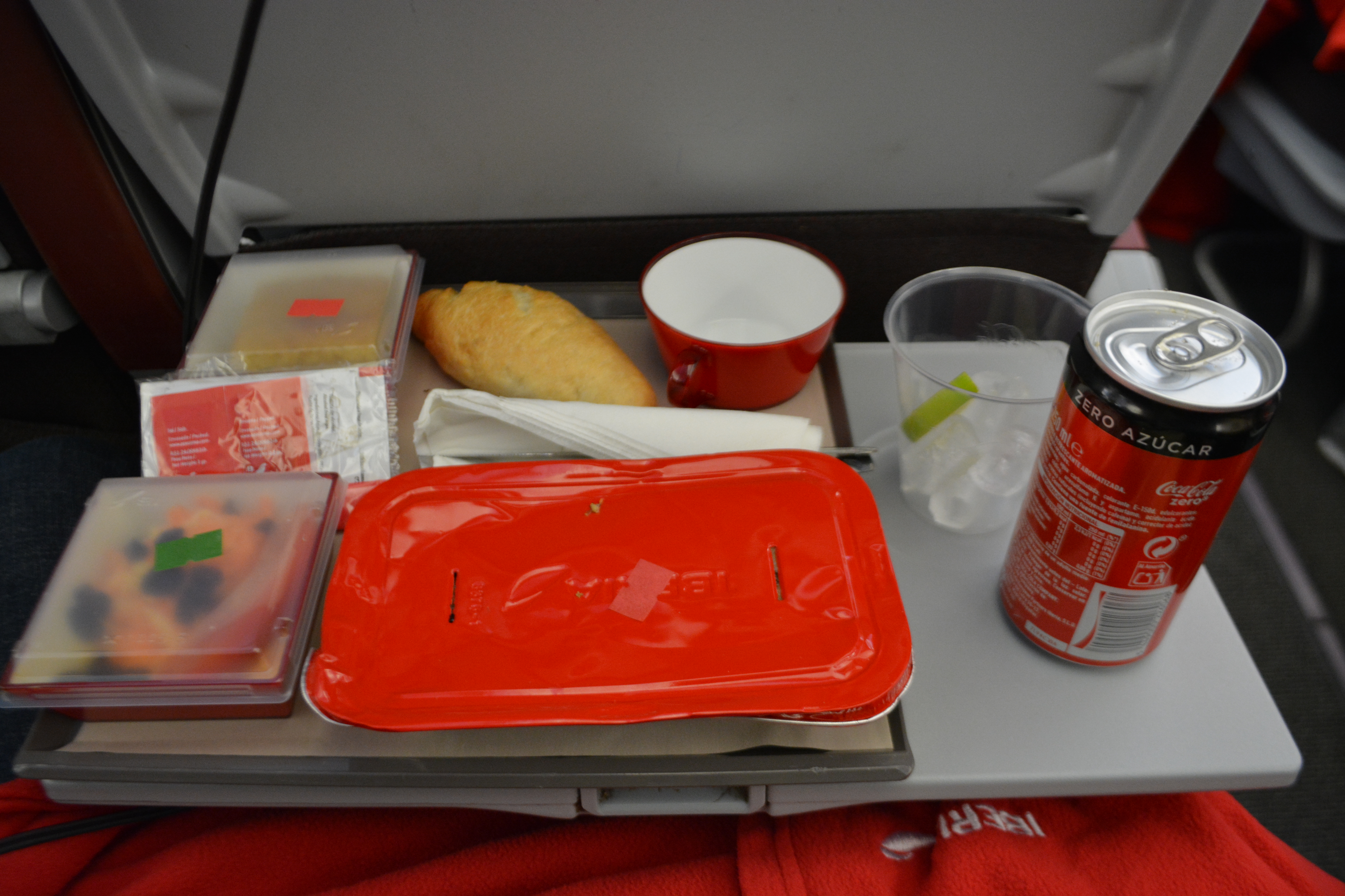 Imagen de una charola con comida de clase económica en Iberia